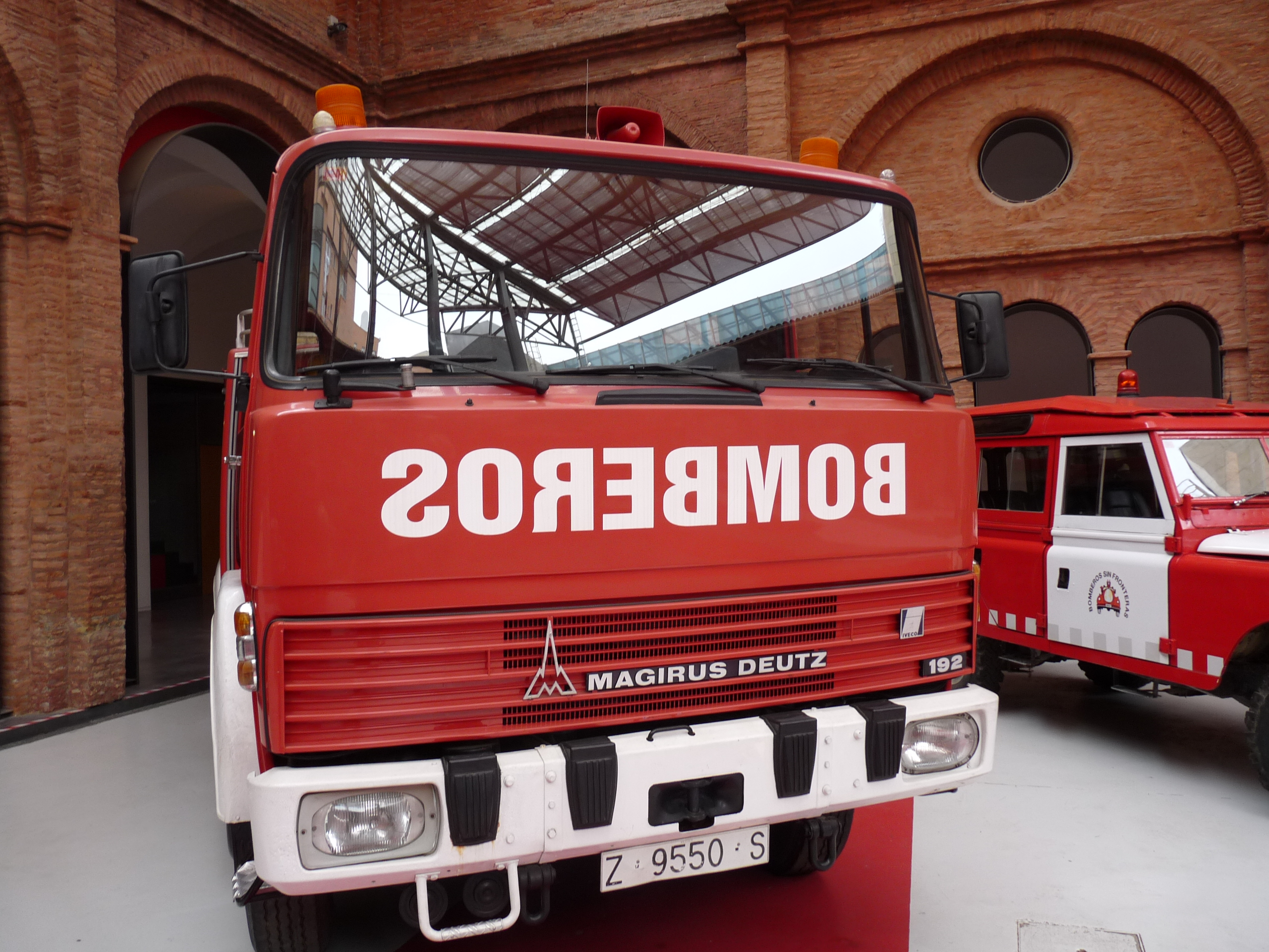 Zaragoza - Museo Bomberos - Bicicletas unidas mediante barras mertálicas, con una caja central para transportar herramientas. Se completa con dos extintores colocados en la parte posterior.